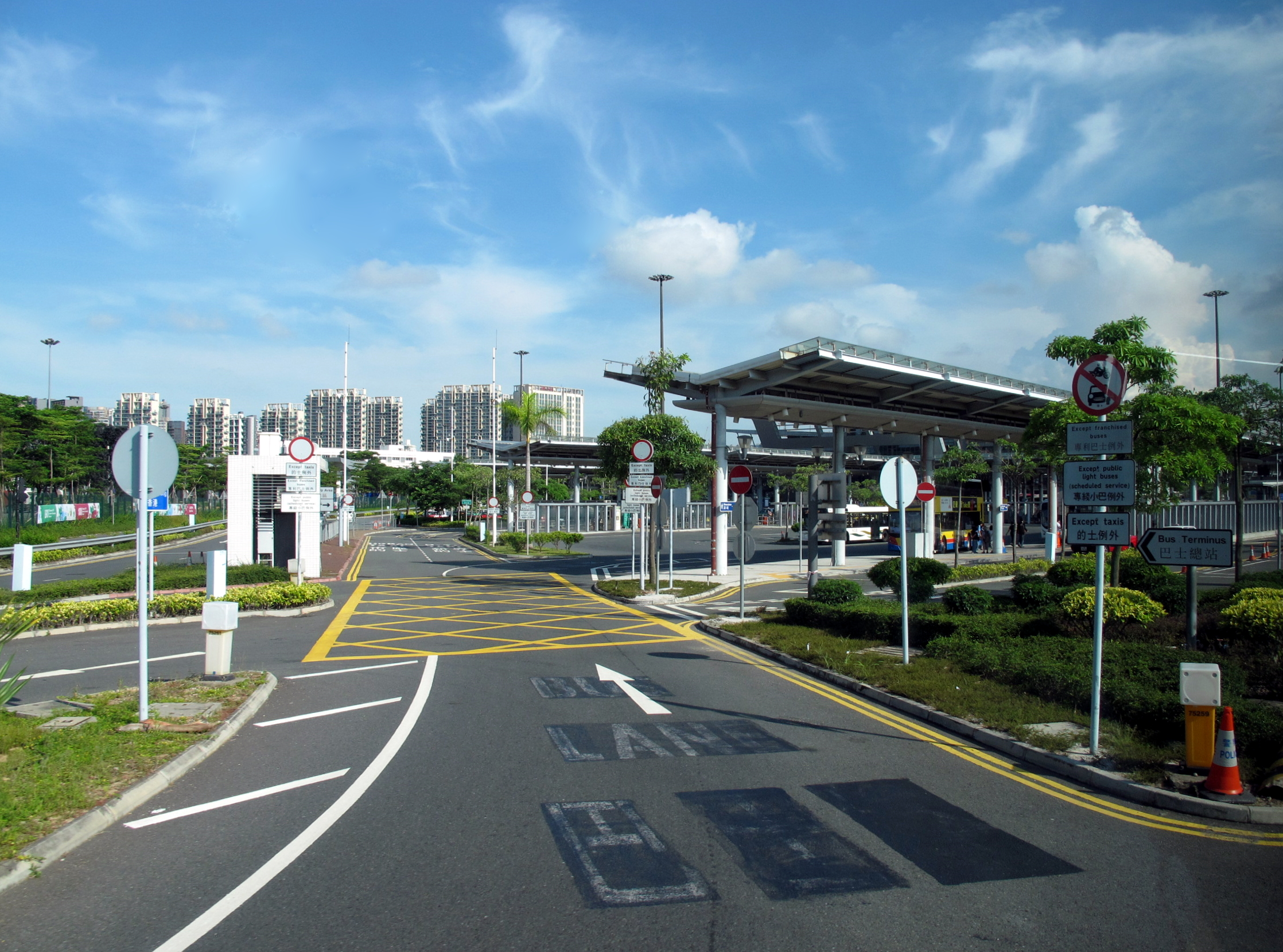 Shenzhen Bay Port Passenger Terminal HK Bus Stop